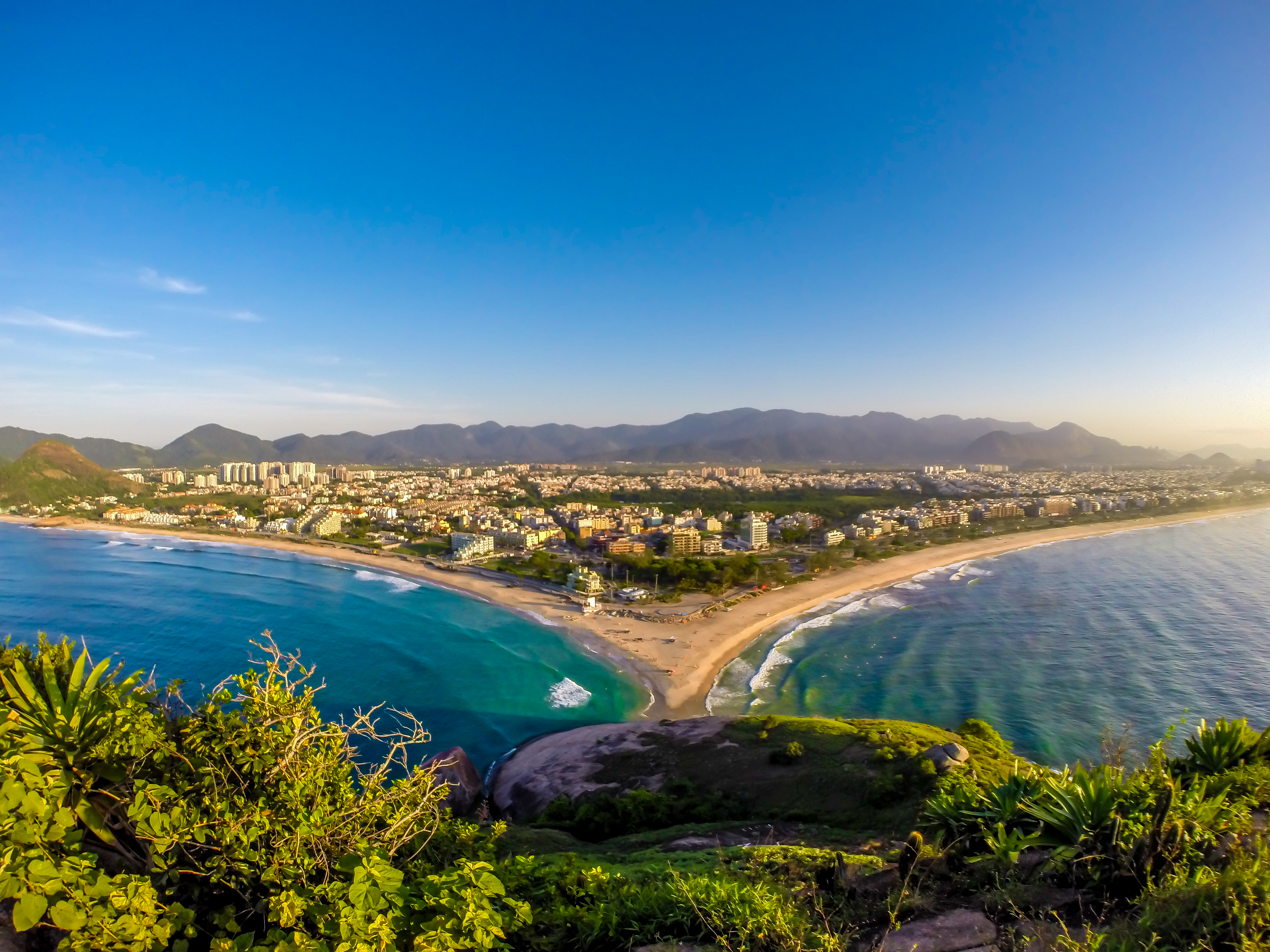 Vista sob a pedra do Pontal visualizando Praia do Recreio